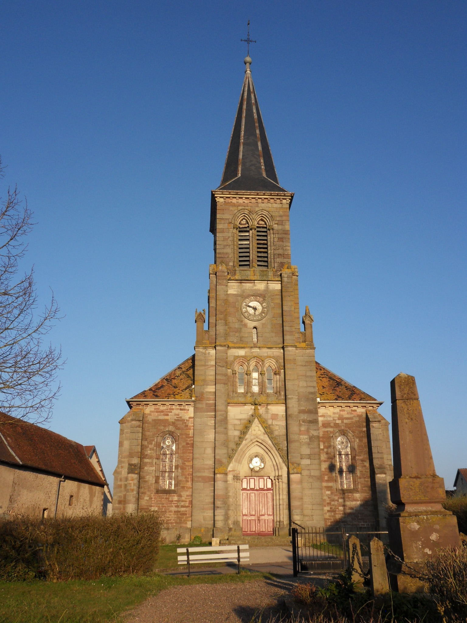 La Villedieu-en-Fontenette - L'église.